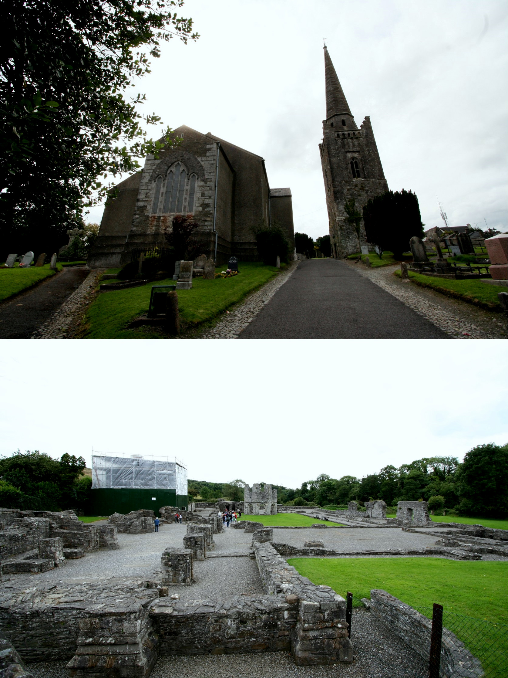 Kells & Mellifont Abbeys